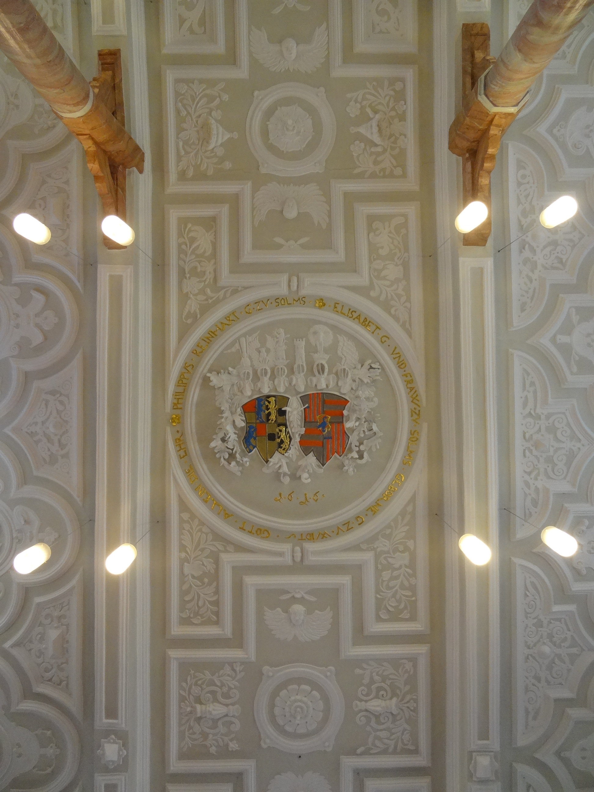 Evangelische Pfarrkirche (Nieder-Weisel)